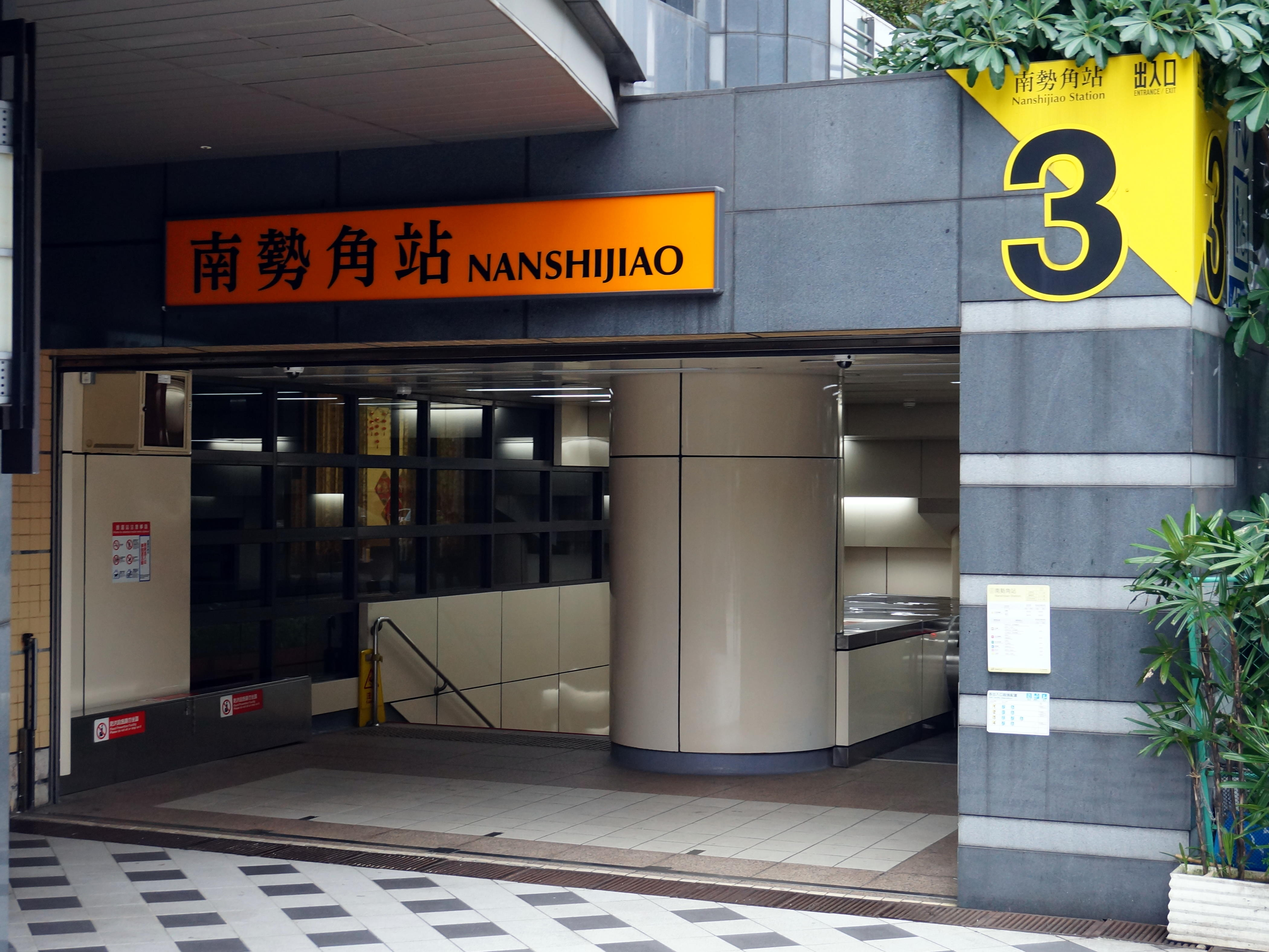 臺北捷運南勢角站3號出口。